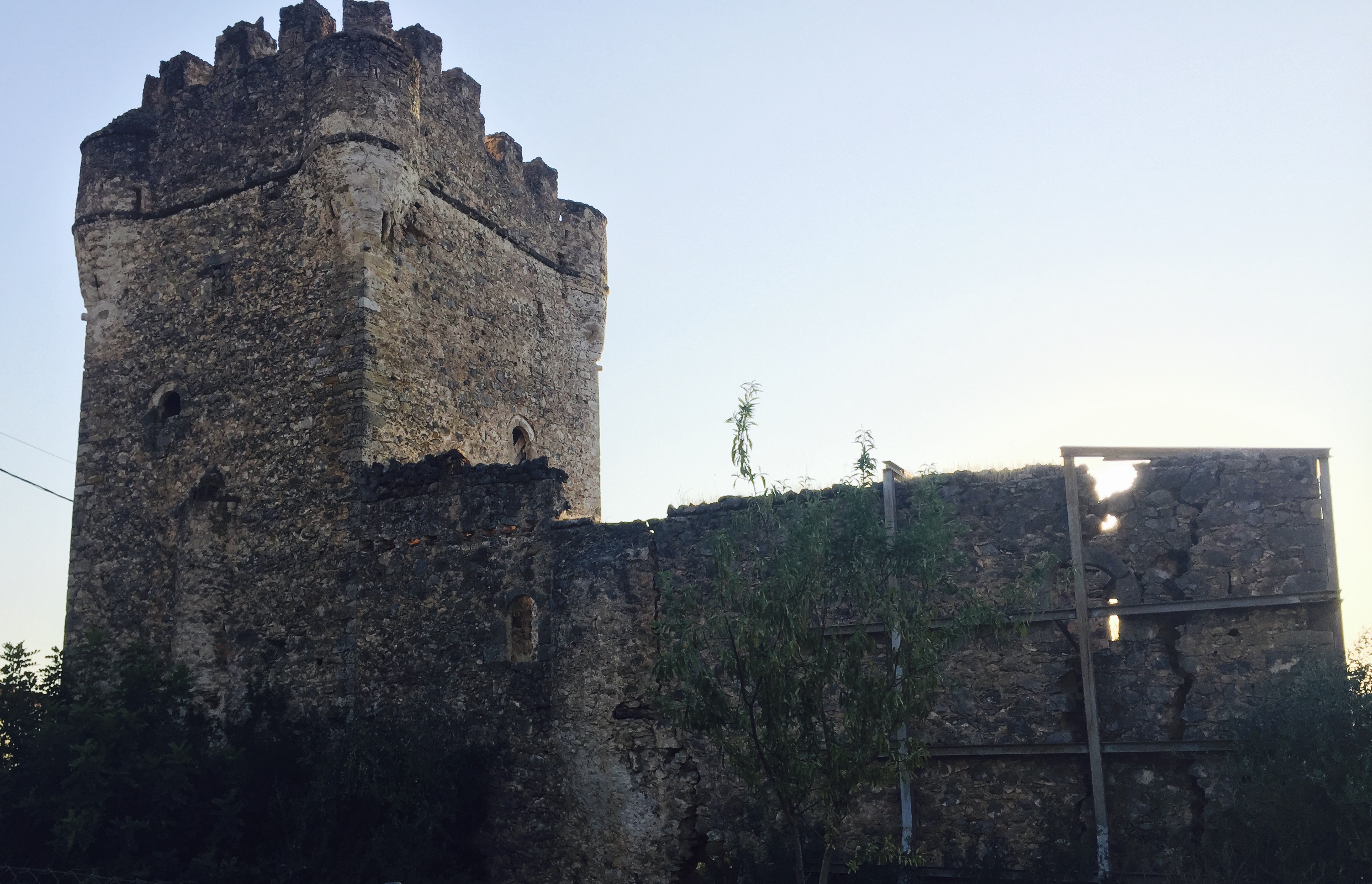 Ο μανιάτικος Πύργος του Παναγιώταρου (Καπετανάκη) στη Μικρή Μαντίνεια.